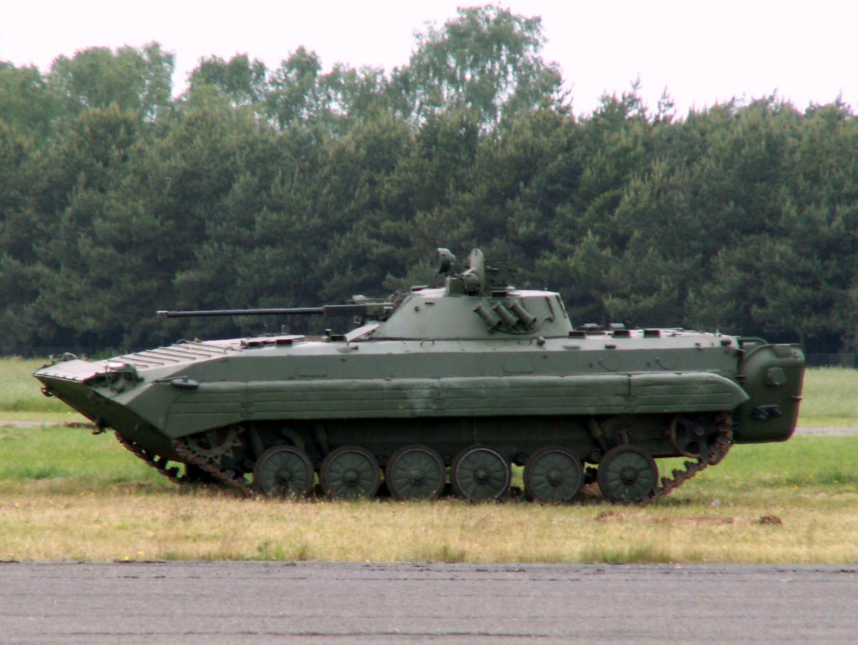 BMP-2 tank at the Open landmachtdagen 2010.